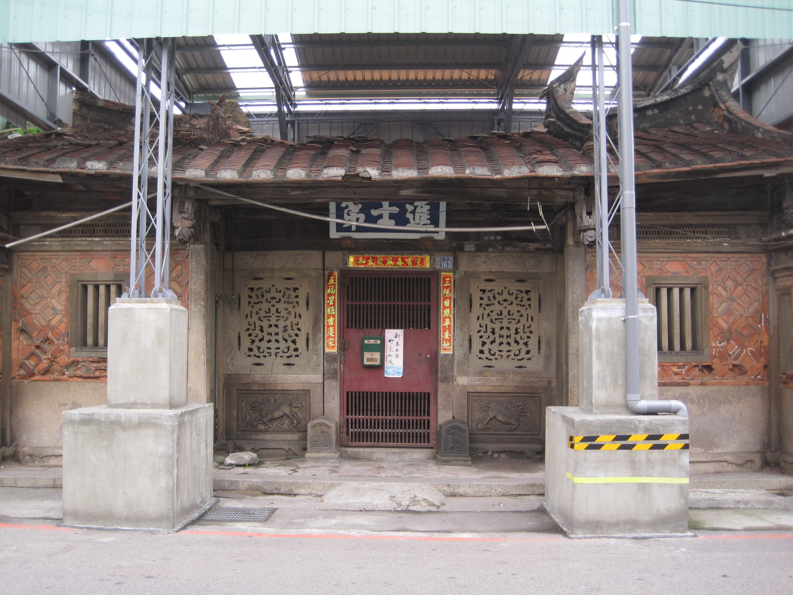 新竹鄭家進士第